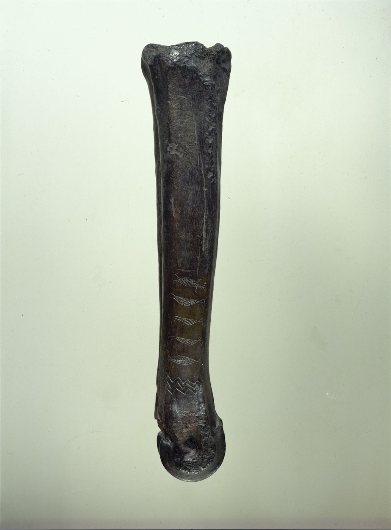 Ornamenteret kølle af ben, enkeltfund, mesolitikum, Ryemarksgård, Jystrup sogn, Ringsted Herred, Sorø Amt